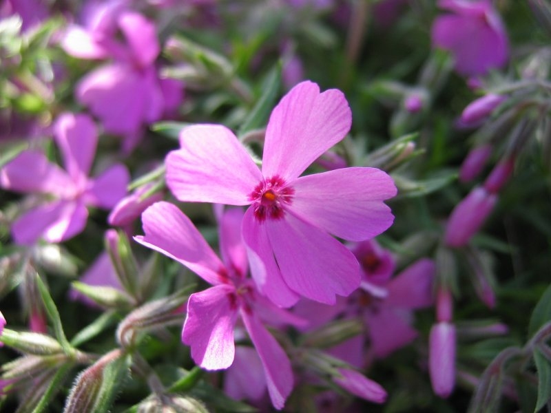 Polsterphlox Phlox subulata